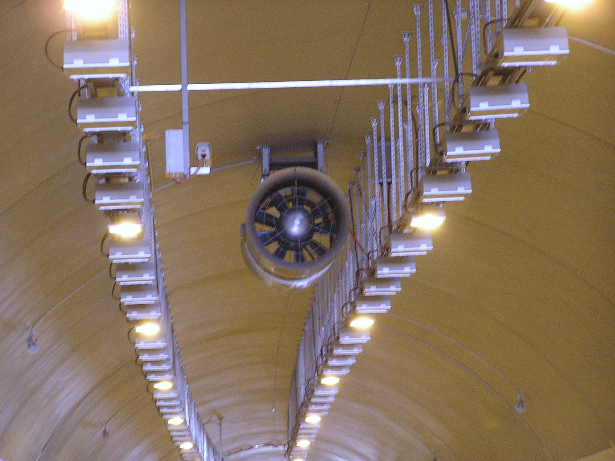 Tunnel Valík, Highway D5, Czech Republic; ventilátor a akomodační osvětlení